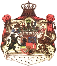 Großes Staatswappen von Mecklenburg-Strelitz, zugleich Wappen des Großherzoglichen Hauses aus: Lippert, Rajko : Das Großherzogliche Haus Mecklenburg-Strelitz, Reutlingen 1994.